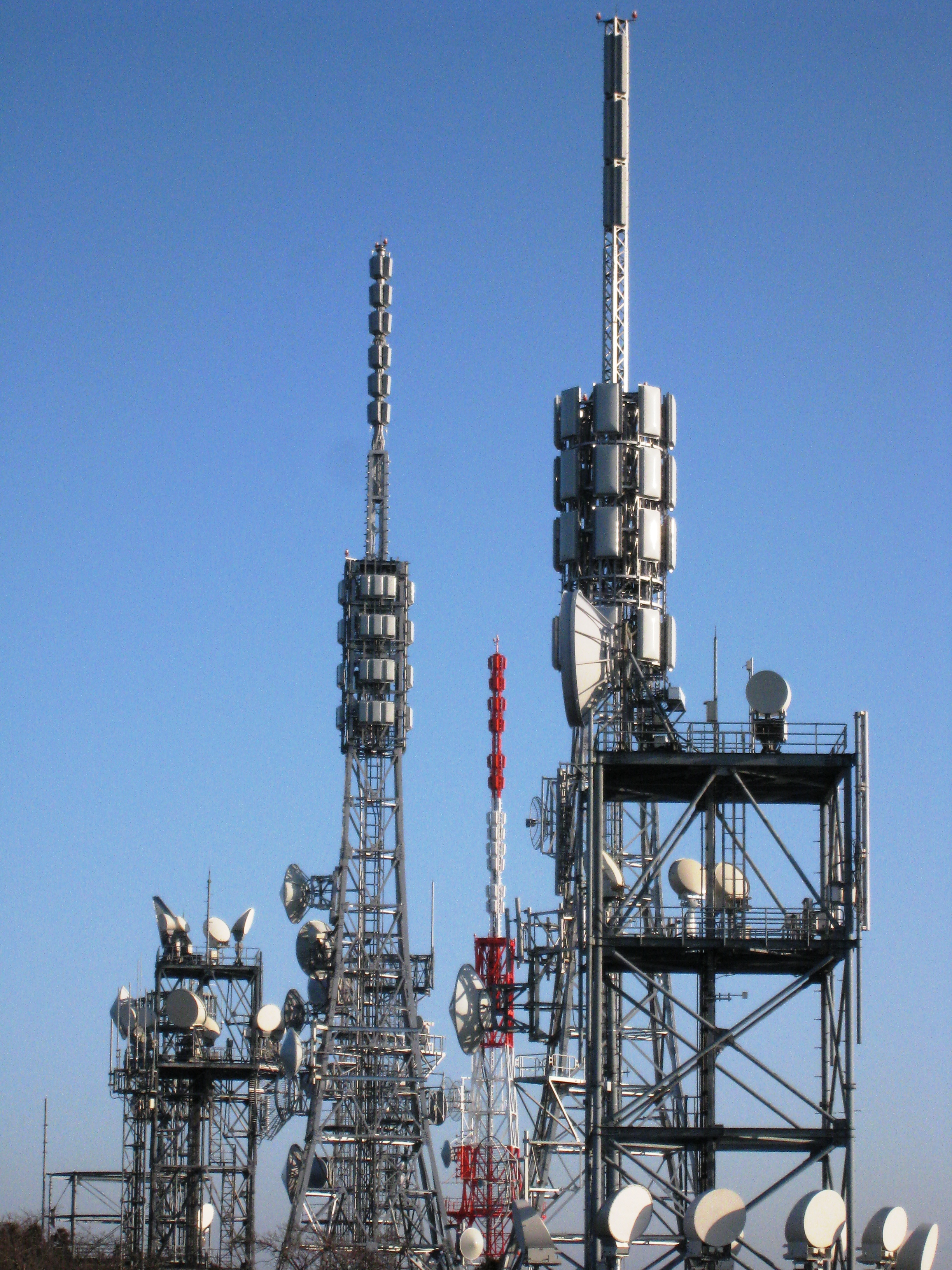 香川県三豊市の「西讃岐テレビ中継局」などの電波塔。